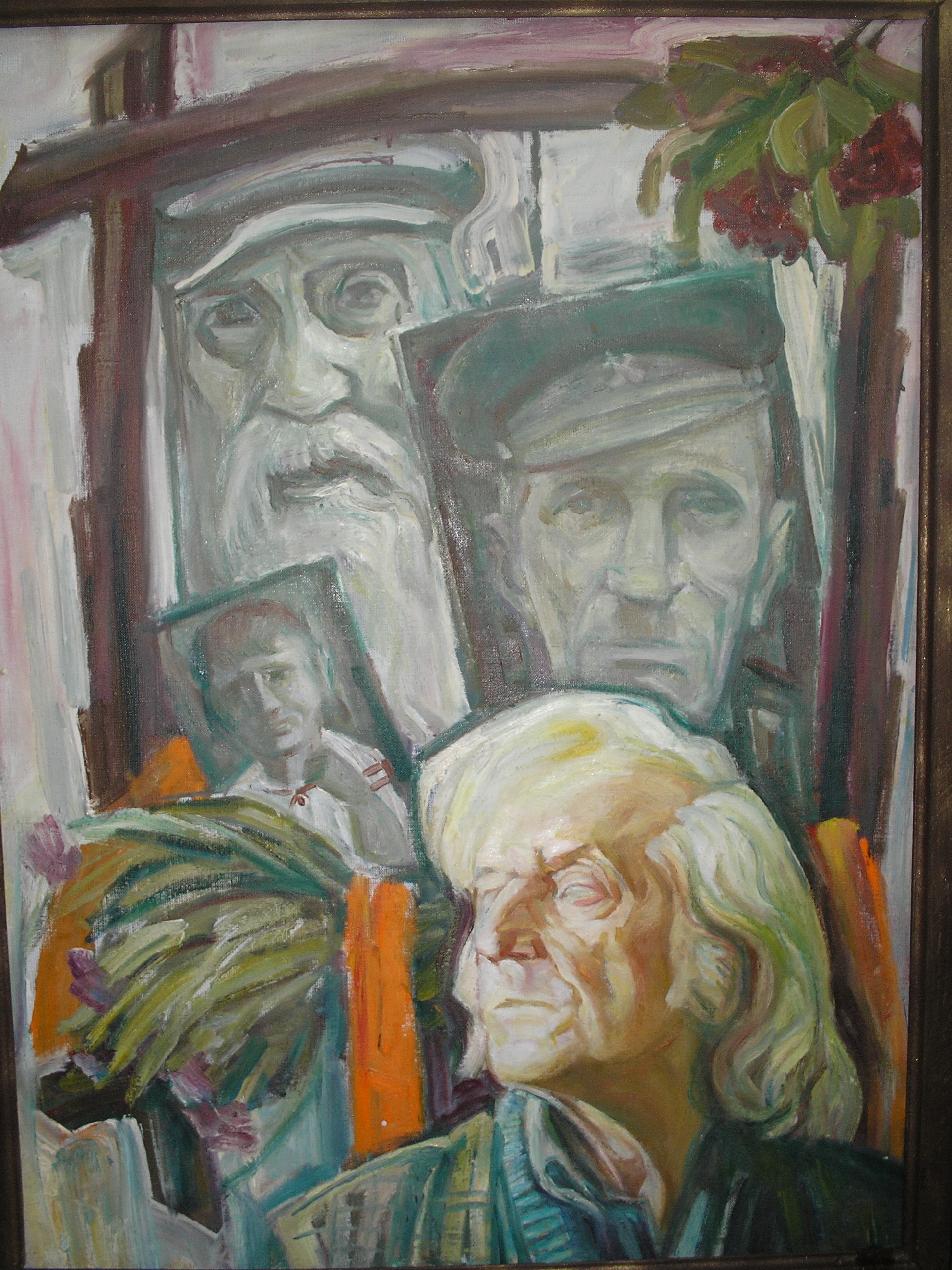 Живописна робота народного художника України Михайла Чорного (м. Вінниця) "Автопортрет на тлі предків", 2006 - полотно/олія - 80х60 см.